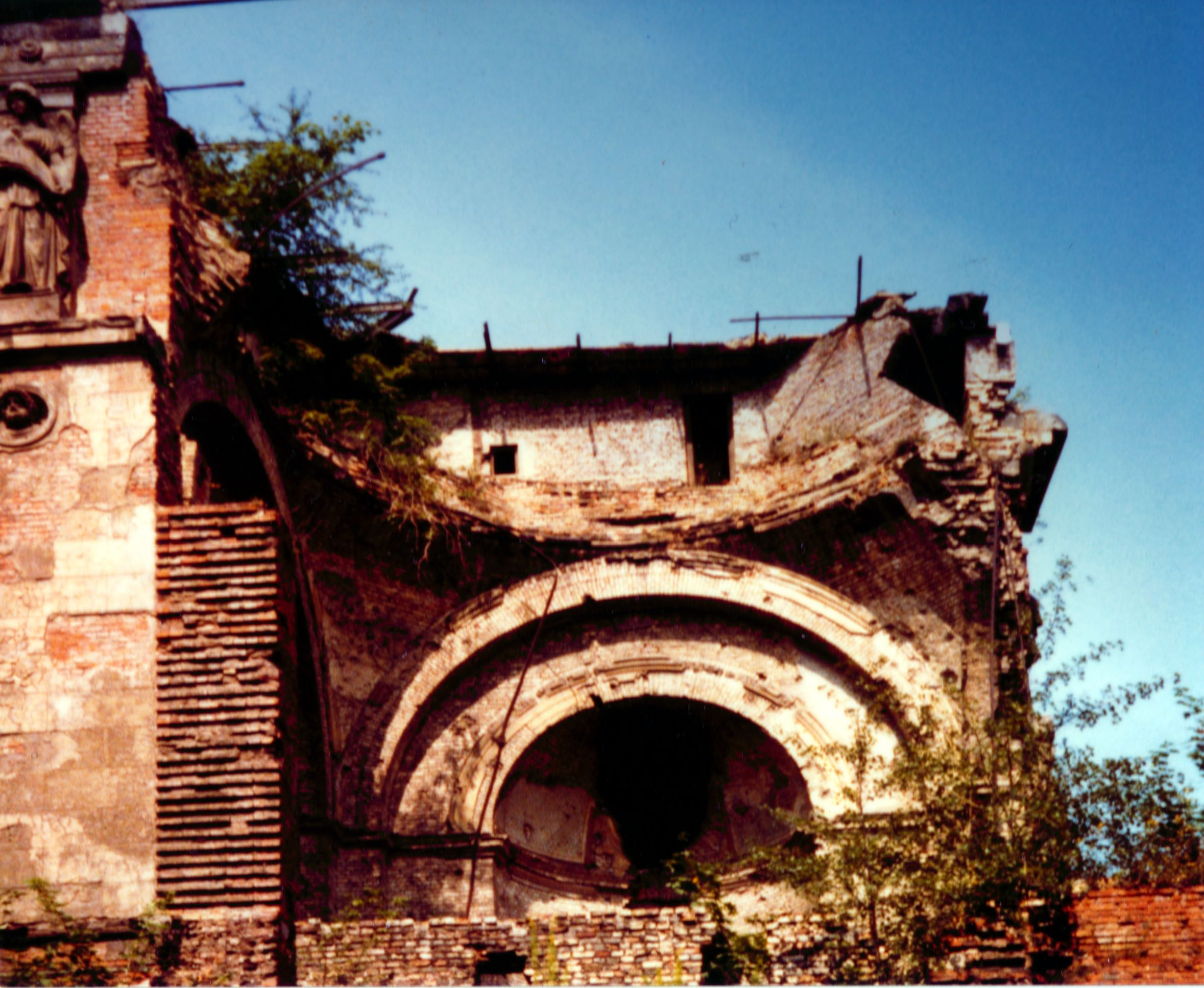 Berlin, Neues Museum, Ruine des Südkuppelsaales Sommer 1984